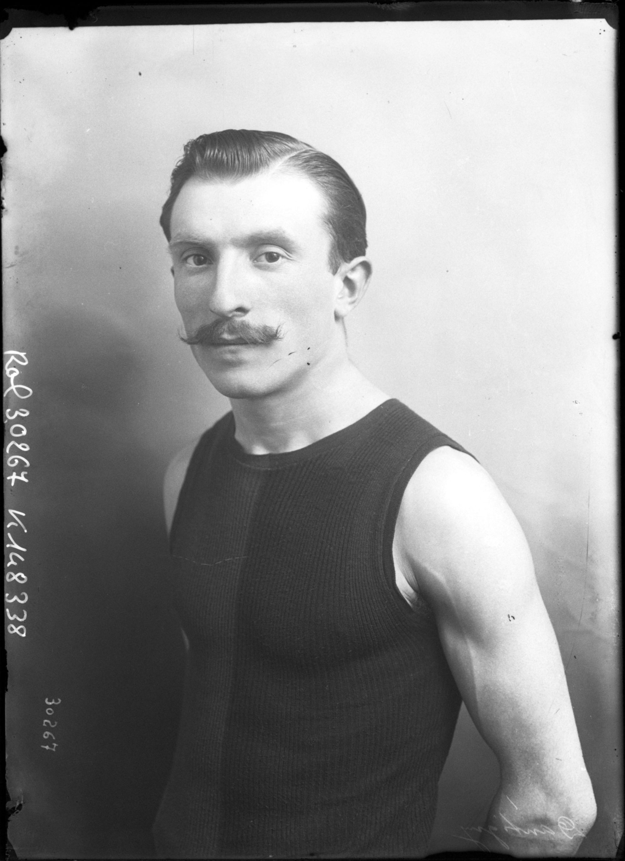 Dantigny (portrait du coureur).